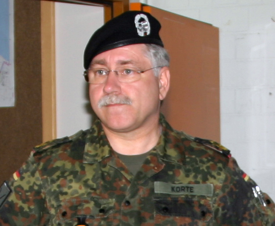 Wolfgang Korte, General der Bundeswehr